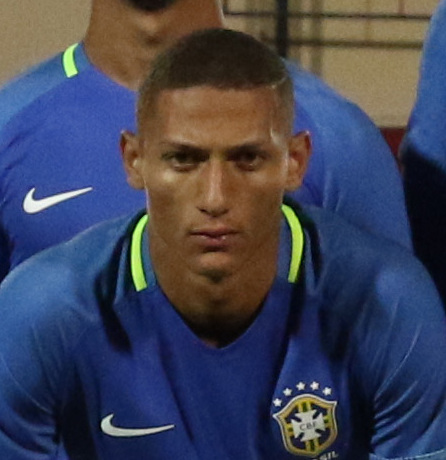 Riobamba, Ecuador, 18 enero 2017 (Andes).- El combinado ecuatoriano dirigido por Javier Rodríguez cayó 1-0 este miércoles ante Brasil en el marco de la primera jornada del Grupo A del Campeonato Sudamericano Sub 20 Ecuador 2017, durante el partido jugado en el estadio Olímpico de Riobamba (centro andino), abarrotado de hinchas. ANDES/Micaela Ayala V.